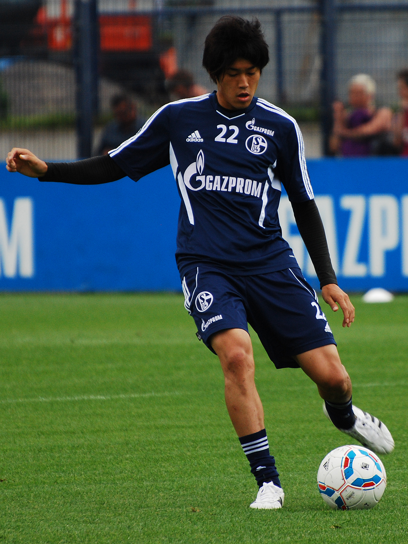 Atsuto Uchida